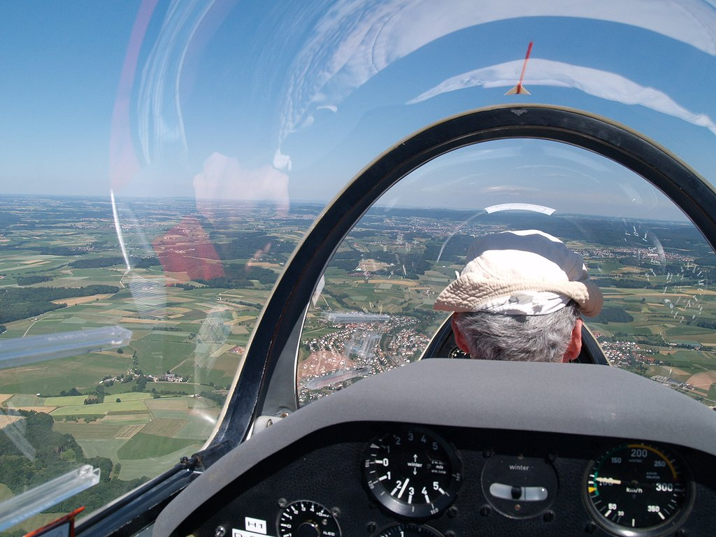 Wollfaden am Segelflugzeug